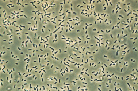 Mikroskopaufnahme von Bacillus subtilis aus Flüssigkultur (Phasenkontrast, 1000fach) Fotographiert von Benutzer:Kookaburra